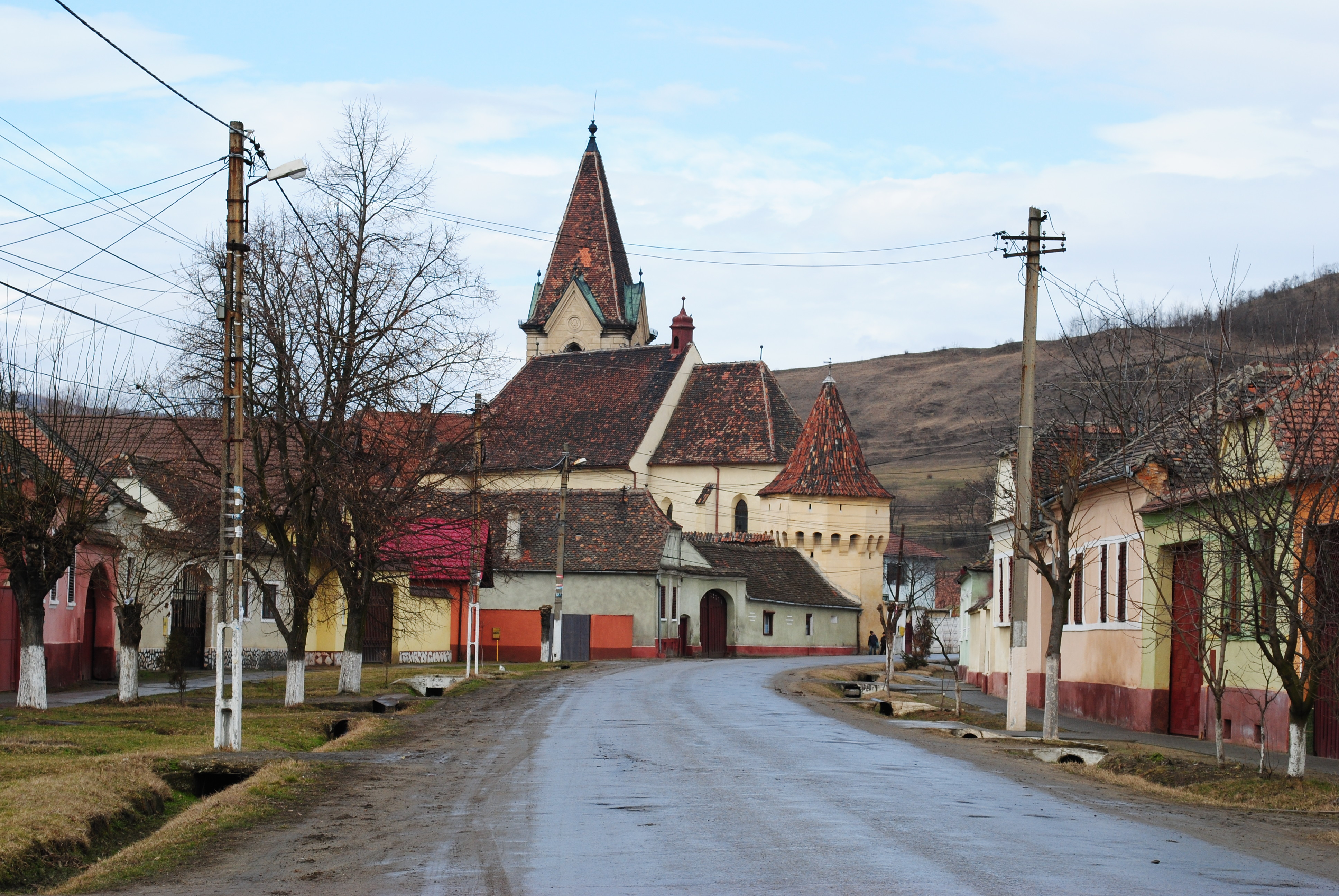 Ansamblul bisericii evanghelice fortificate, sec. XIV - XIX